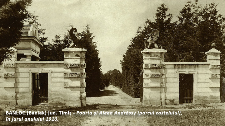 Banloc (Bánlak), jud. Timiș - Poarta și Aleea Andrássy (parcul castelului Karátsonyi), în jurul anului 1910. Cunoscută și numele de „Poarta leilor” și „Aleea Brazilor” (sau „Drumul Andrașului”). Aspect dispărut. 02